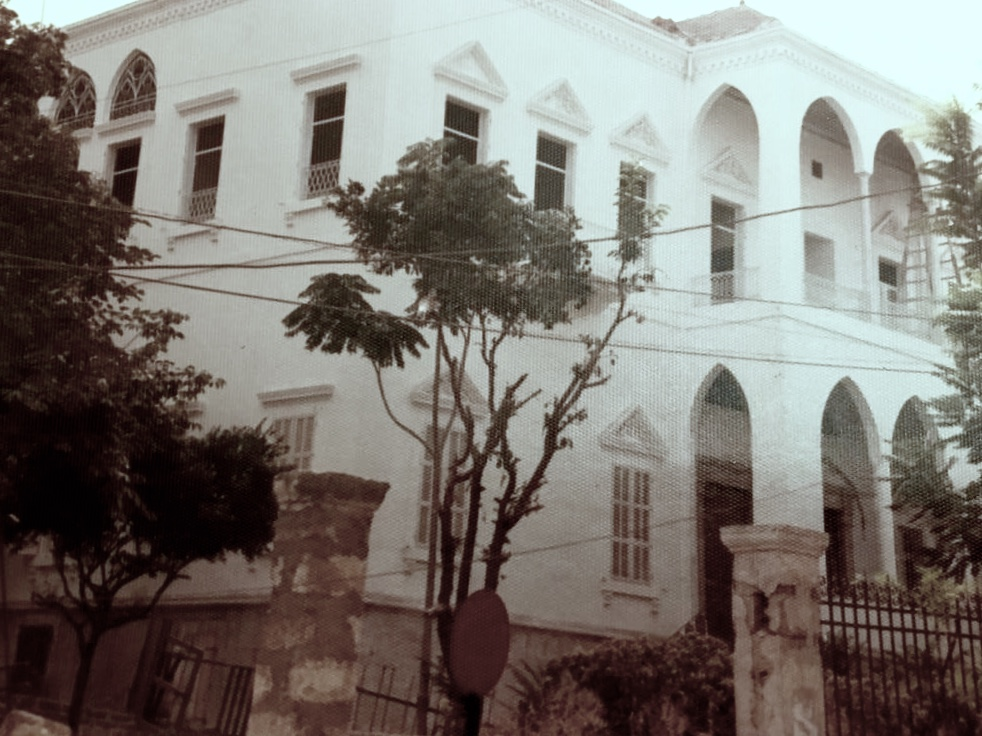 Construit en 1902, le palais Gabriel Saadé est une des demeures construites par la famille Saadé à Lattaquié